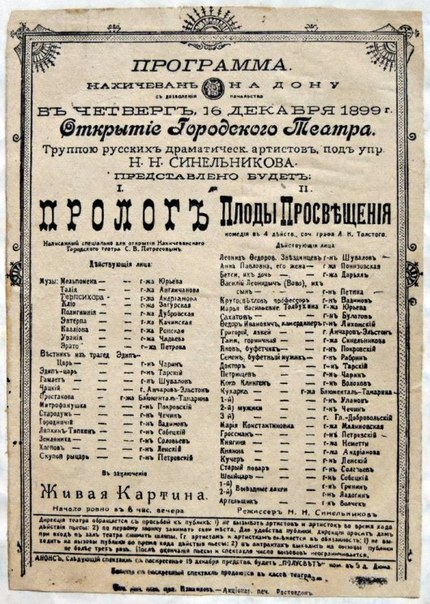 Нахичевань-на-Дону. Афиша городского театра 1899г